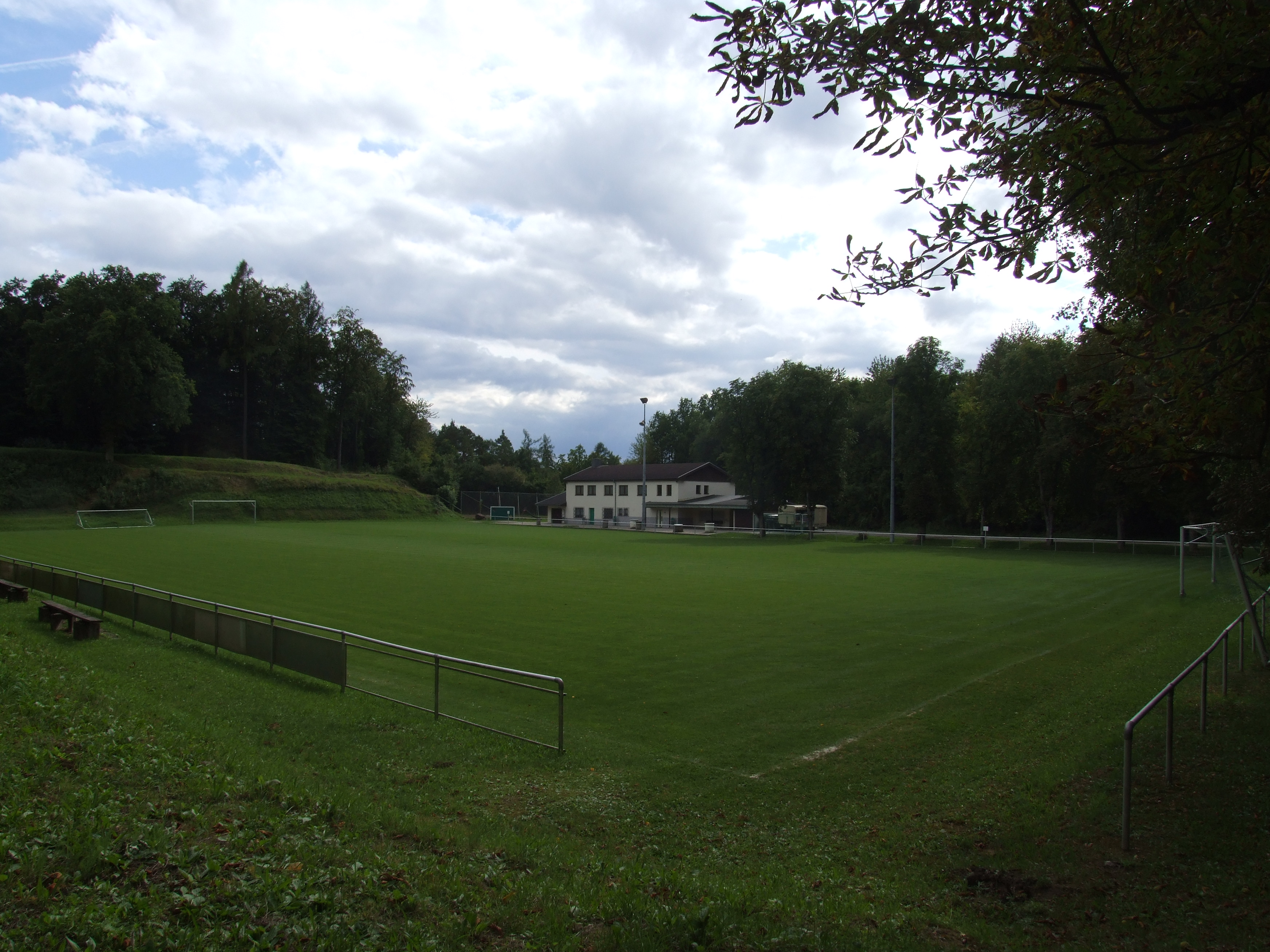 Sportplatz des FC 1920 Eschelbronn am Kallenberg